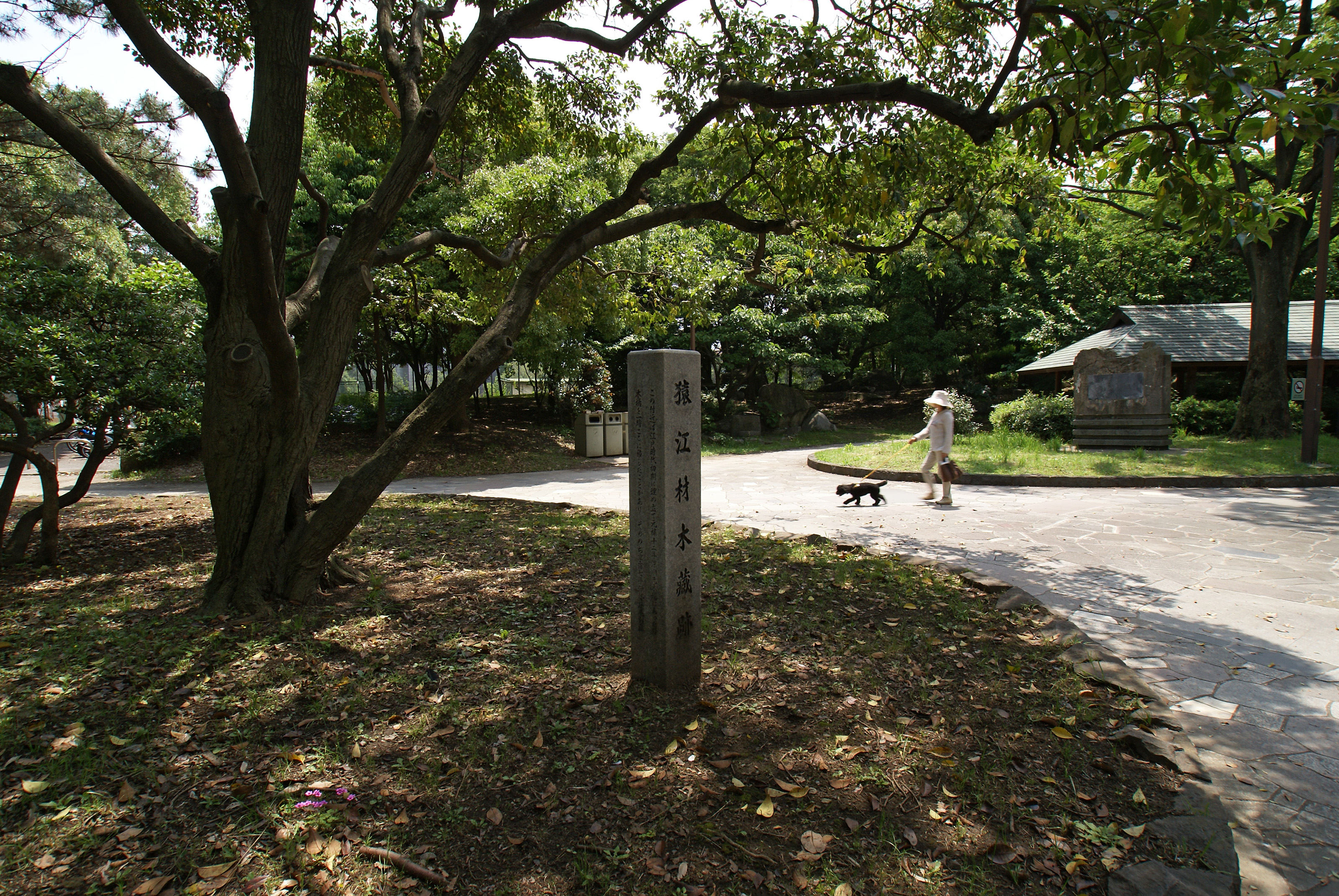 Sarue park in Koto-ku, Tokyo, Japan